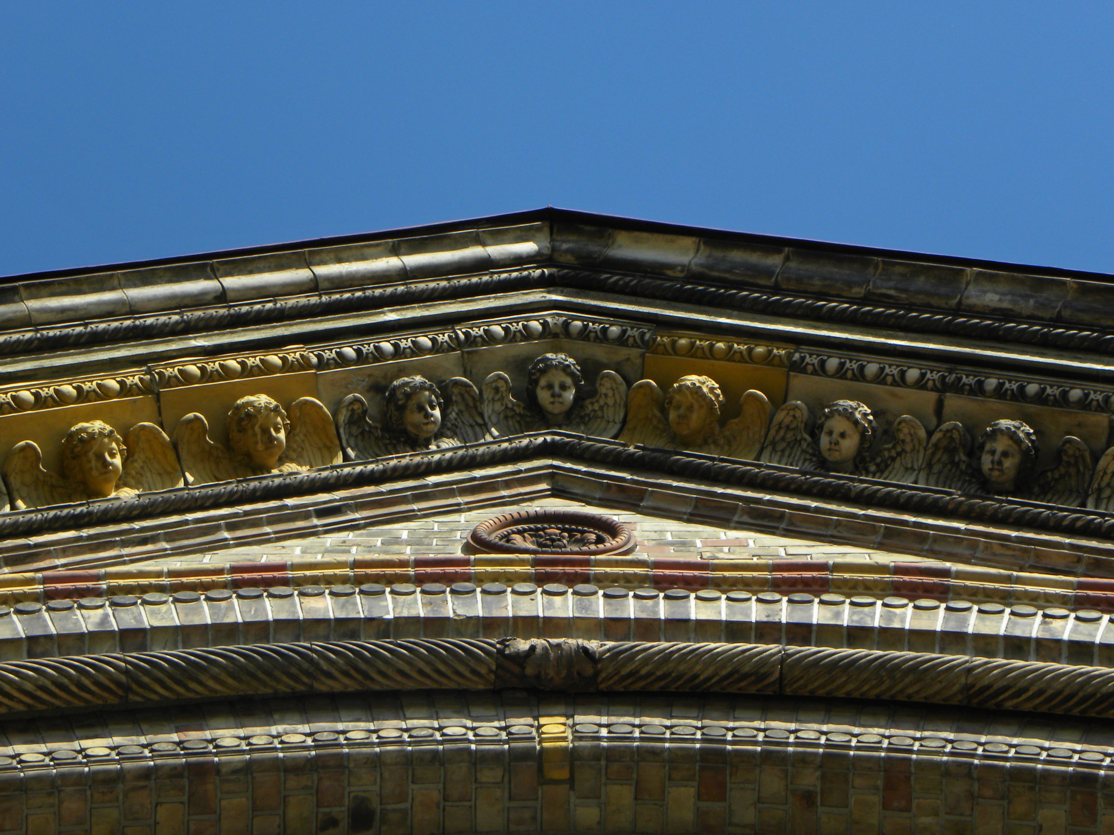 Kath. Pfarrkirche, Breitenfelder Pfarrkirche hl. Franziskus Seraphicus